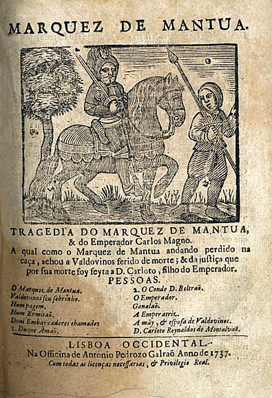 Marquez de Mantua, de Baltasar Dias, Lisbonne, 1737.